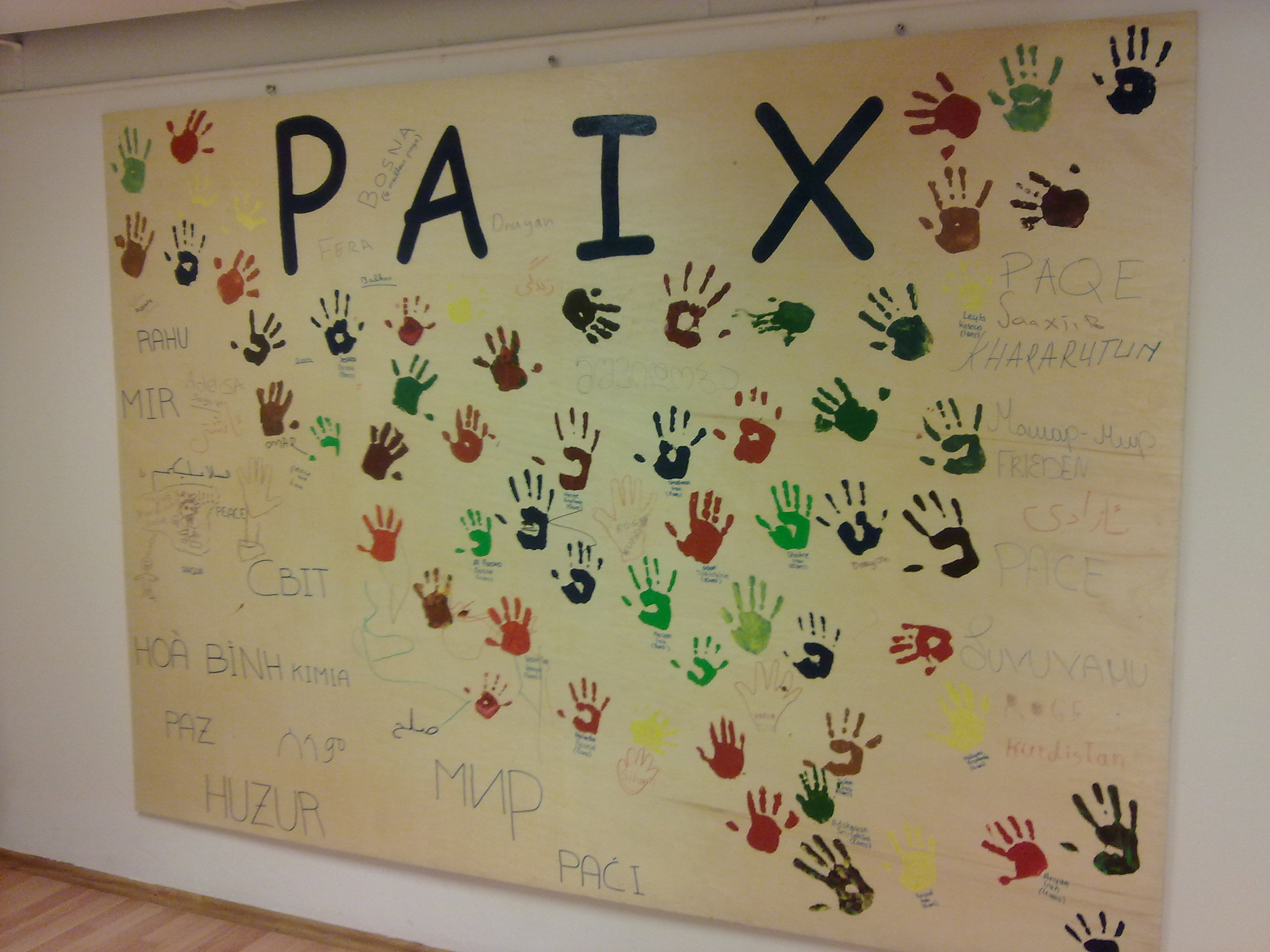 Un panneau réalisé par des requérants d'asile du centre d'hébergement collectif de Saconnex, à Genève (Suisse), et accroché dans des locaux du centre.